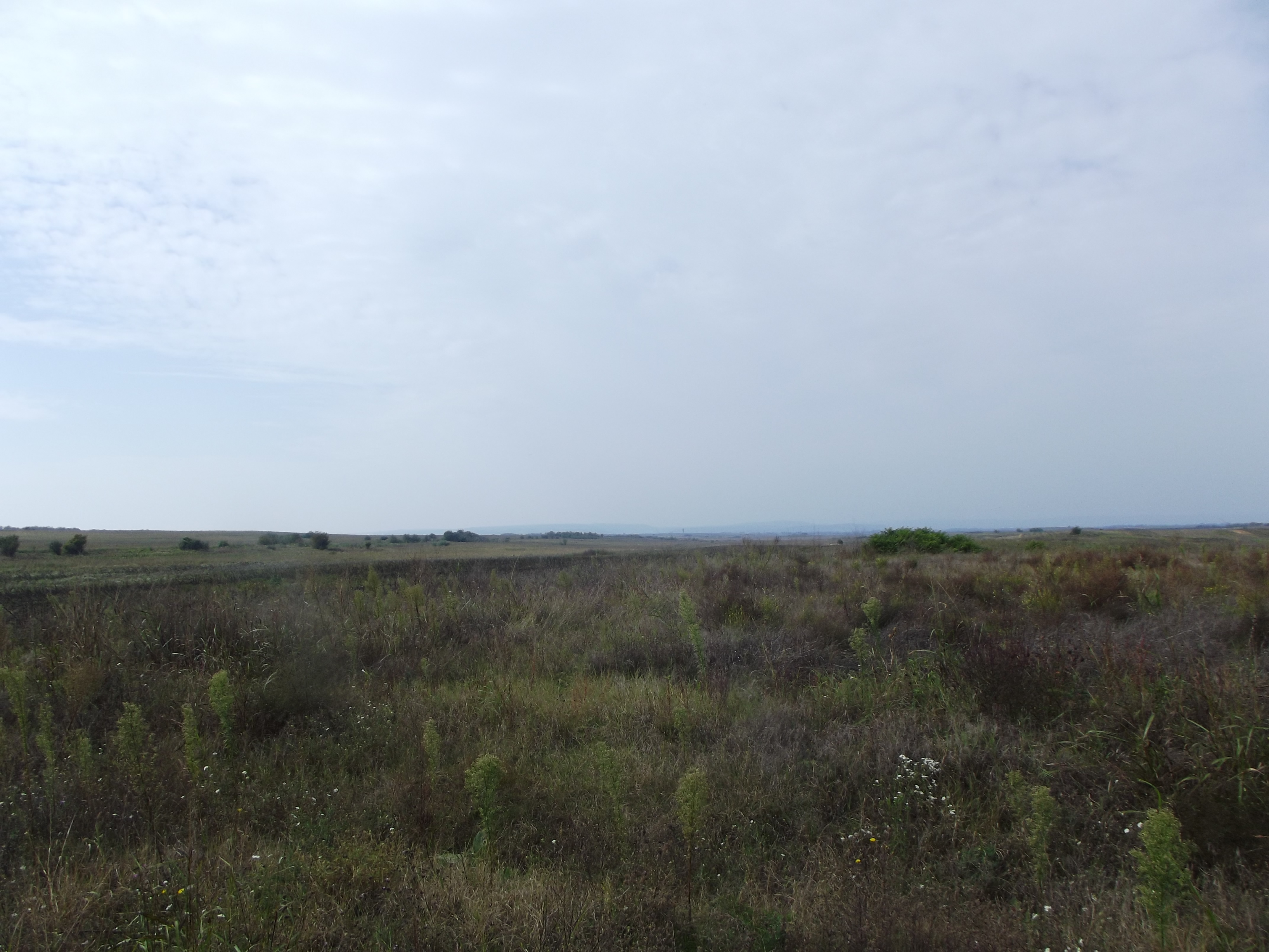 Местност Таула, Ново село, Видинско